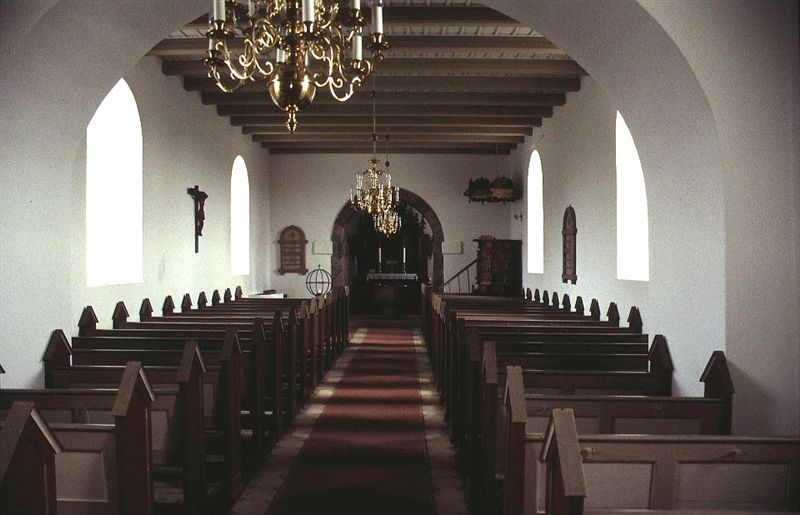 Aidt Kirkes indre set mod øst